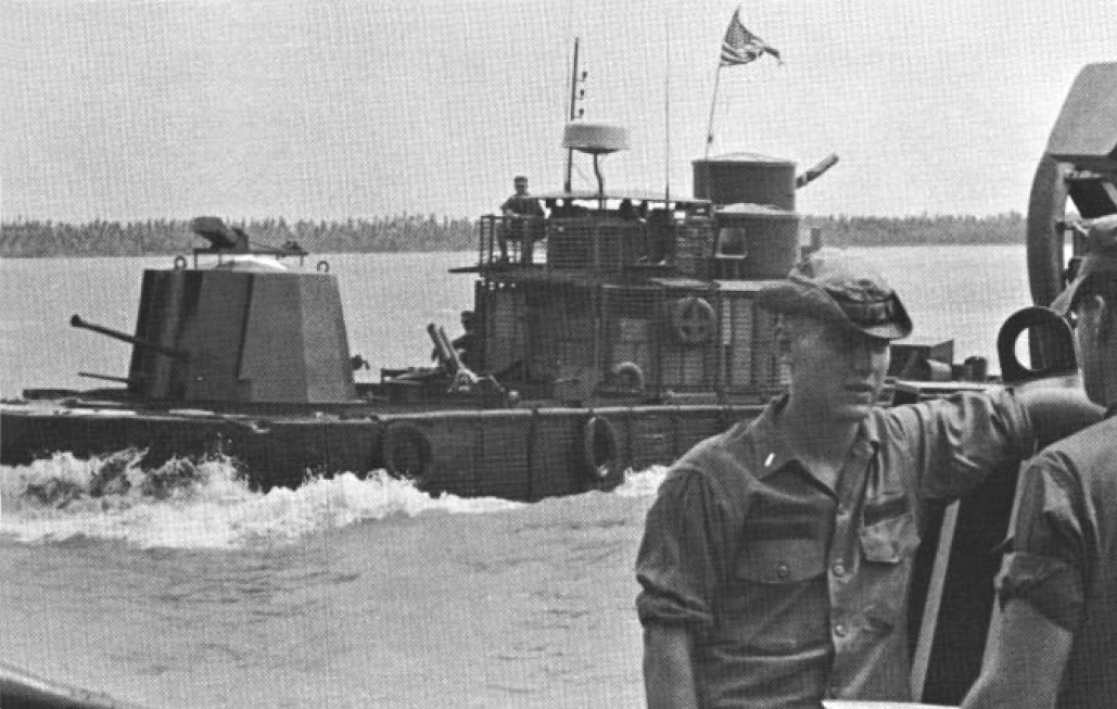 A U.S. Navy monitor in Vietnam, circa 1968.